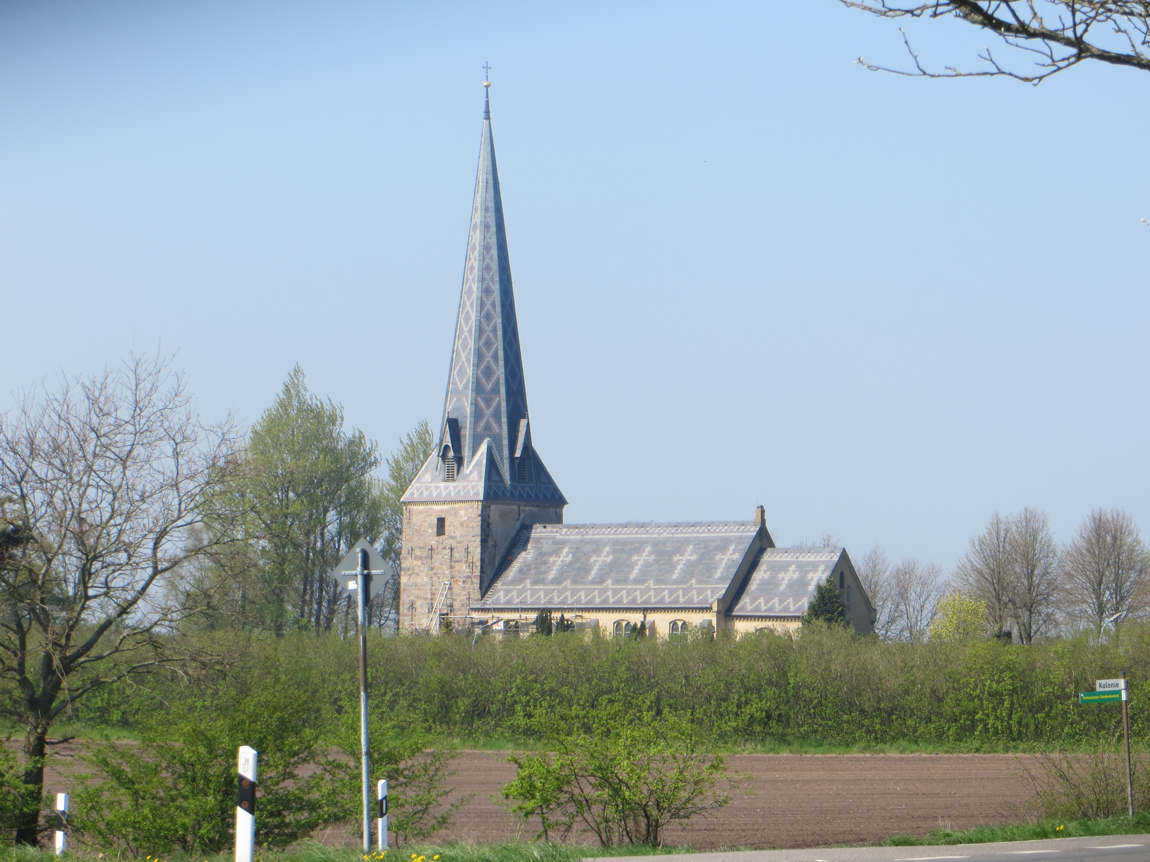 Kirche Handewitt von Osten aus gesehen